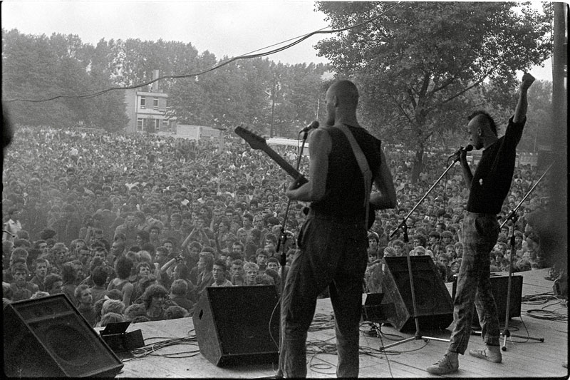 Koncert zespołu Siekiera na Festiwalu Muzyków Rockowych w Jarocinie (4 sierpnia 1984). Od lewej: Tomasz Adamski i Tomasz Budzyński.